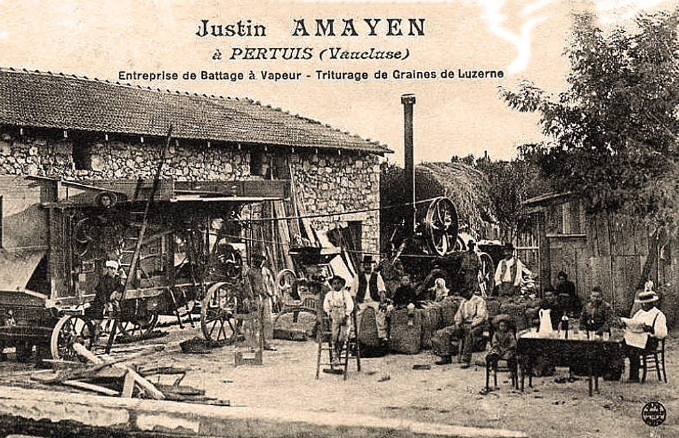 Machine à vapeur agricole pour battage et triturage